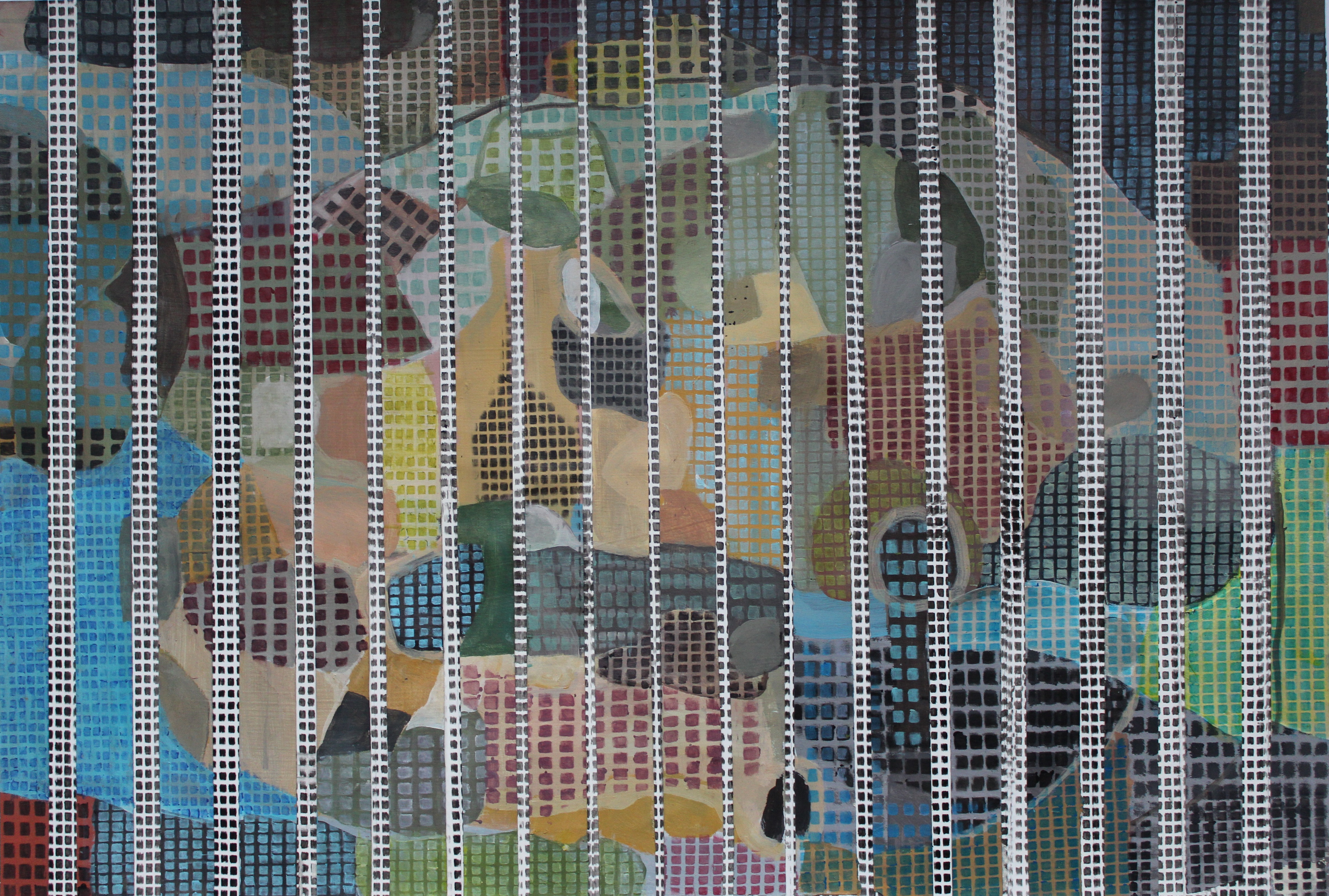 Acryl auf Papier 40x50